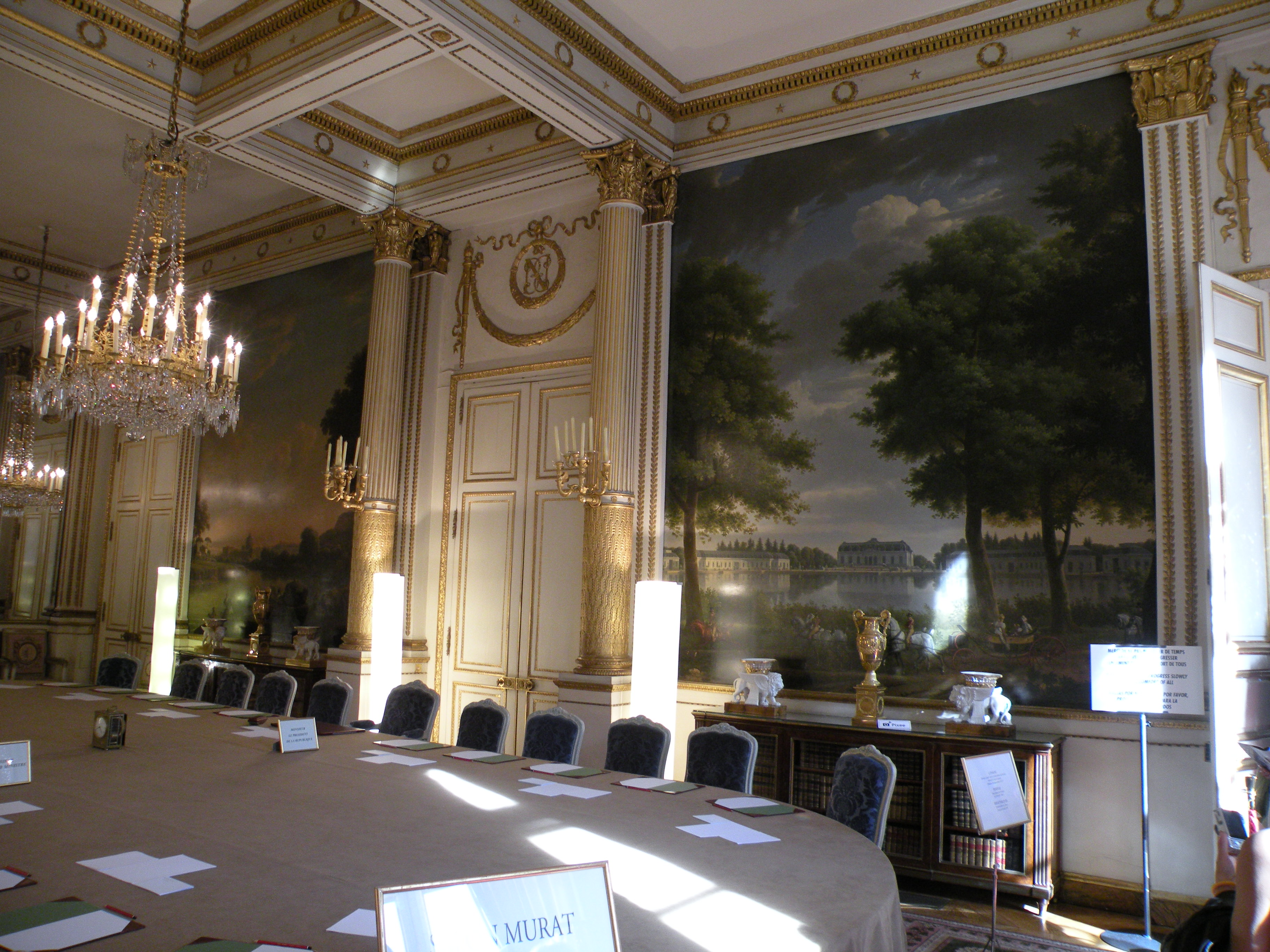 salon murat